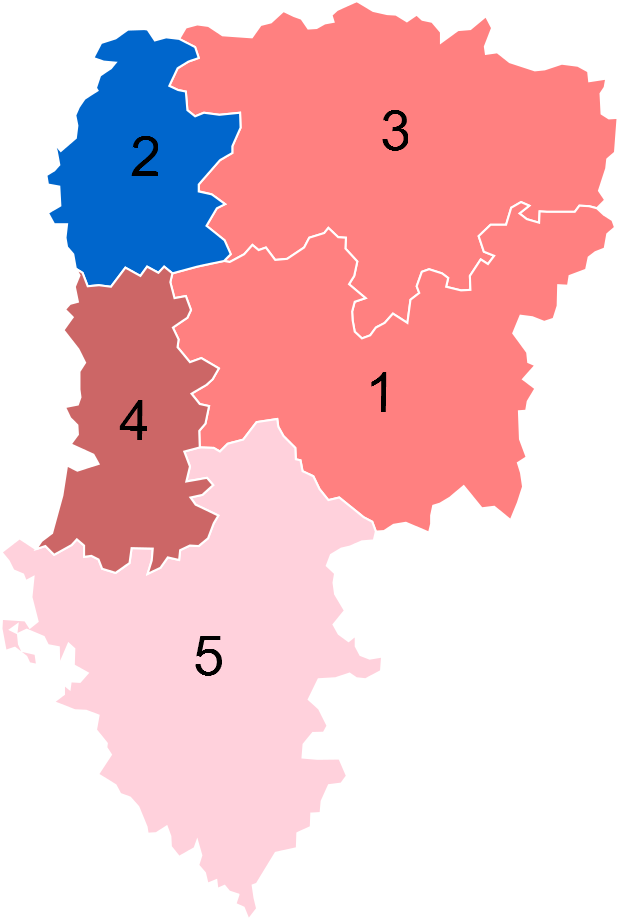 Résultats des élections législatives de l'Aisne en 2012